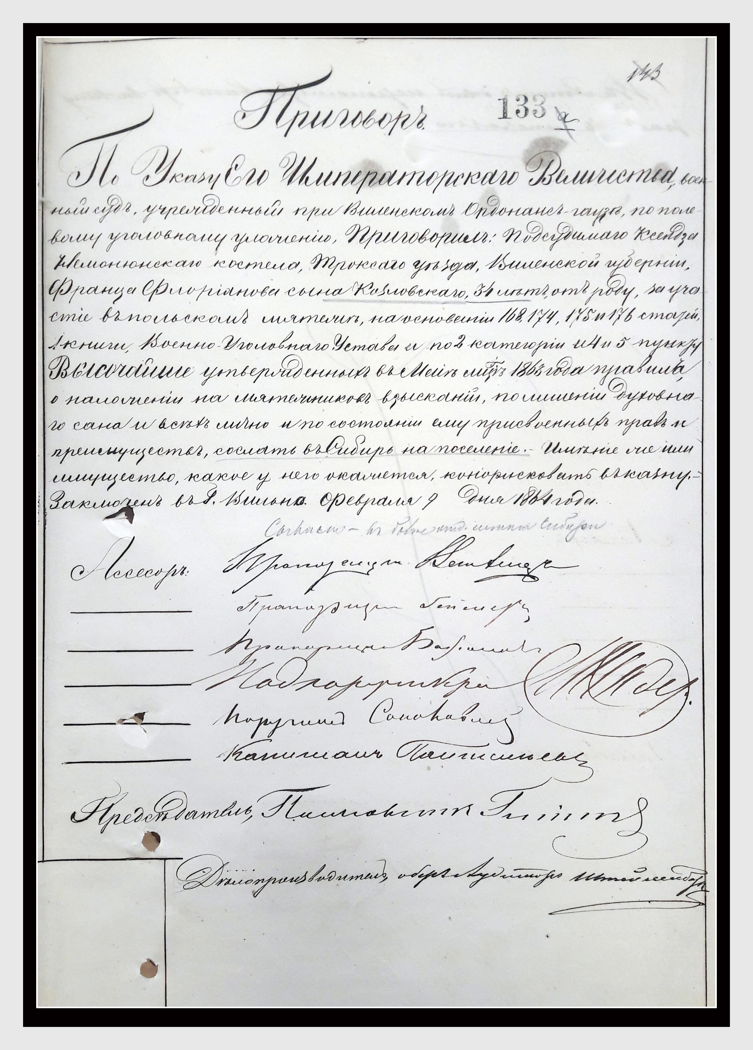 kunigo Prano Kazlausko nuosprendis